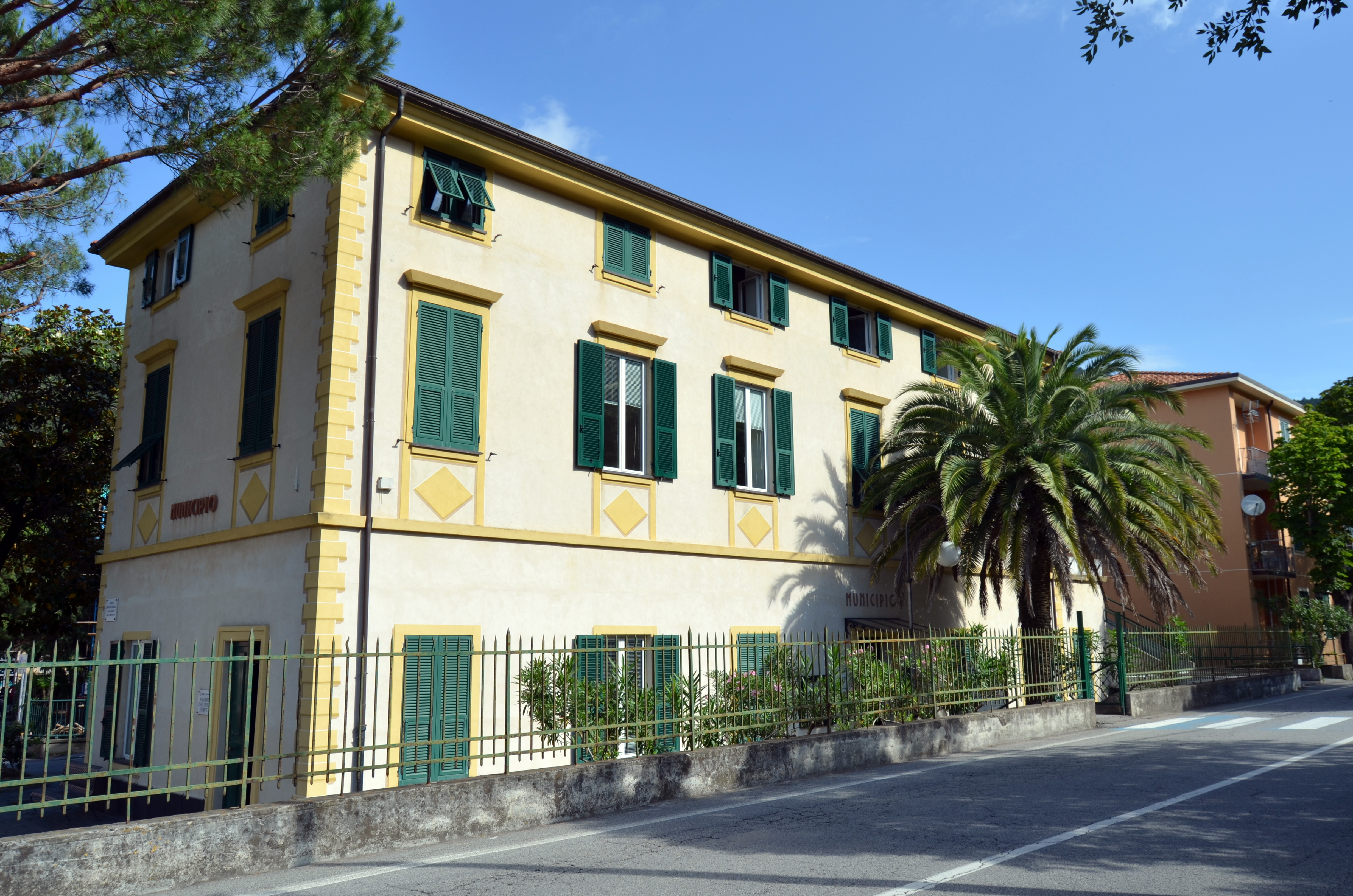 Il municipio di Deiva Marina, Liguria, Italia